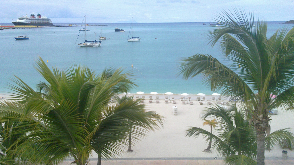 moby.to/3jy92r